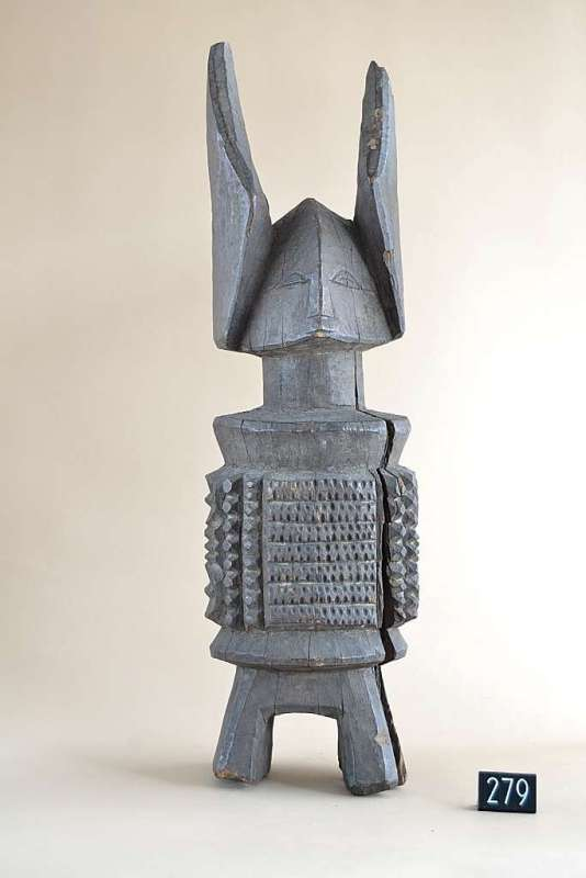 STATUA IKENGA - Figura antropozomorfa costituita da corpo cilindrico densamente inciso, poggiante su quanttro piccoli supporti obliqui. Testa a cresta con lunghe corna laterali. Assente la rappresentazione degli arti superiori, Gli Ikenga sono altari personali che mediano il rapporto fra il ""guerriero"" e la propria divinità pesonale (chi); sono oggetto di offerte sacrificali accompagnate da richieste. In un contesto sociale fortemente competitivo e individualista come quello igbo, gli ikenga assicurano al suo proprietario la forza per poter avere successo nelle sue imprese. Si tratta solitamente di figure umane in posizione seduta che impugnano un coltello e talvolta, nell'altra mano, la testa del nemico ucciso. Al di sopra della testa si levano lunghe corna che possono avere forma diversa ma che vengono sempre identificate con quelle dell'ariete. La complessità della sovrastruttura (in cui possono anche comparire animali a figura intera) dipende dallo status sociale della persona. Ikenga più piccoli e più semplici come quello qui in oggetto sono invece usati dagli indovini nelle pratiche divinatorie.